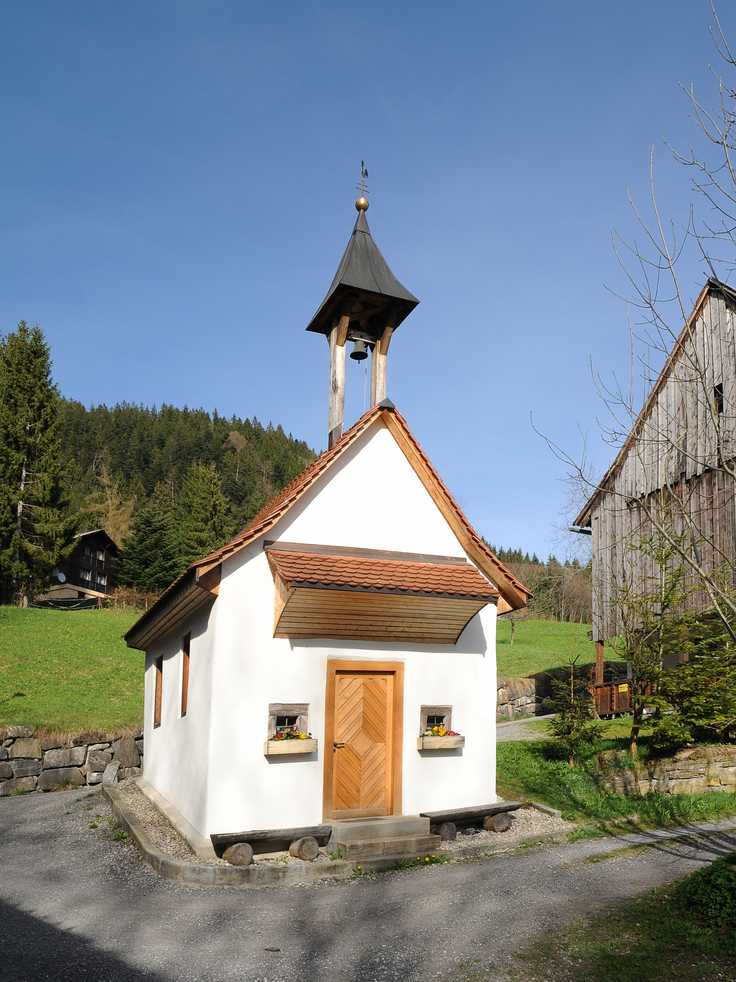 aus dem DEHIO Vorarlberg 1983: Kapelle hl. Maria, in Schauner. Erbaut 1674; Restauriert 1791,1853 (und 2002). Rechteckbau mit 3/8 Abschluß, Satteldach, Glockendachreiter über der Fassade. Betraum mit flacher Holzdecke mit Gemälde Krönung Mariens, bezeichnet Ig. Schwendinger, Maler, 1853, restauriert von F. Rösner, 1967. Altarbild Rosenkranzmadonna mit Hll. Wendelin und Martin. Figuren links hl. Maria mit Kind, 19 Jh., rechts Pietà, Mitte 18. Jh. Kreuzwegstationen bezeichnet 1791 IRBM. - Gemälde hl. Maria mit Kind über dem Fegefeuer, bezeichnet "Michael Mohr v. Heiligenberg 1713" (Erbauer der Kapelle). Die Kapelle steht unter Denkmalschutz